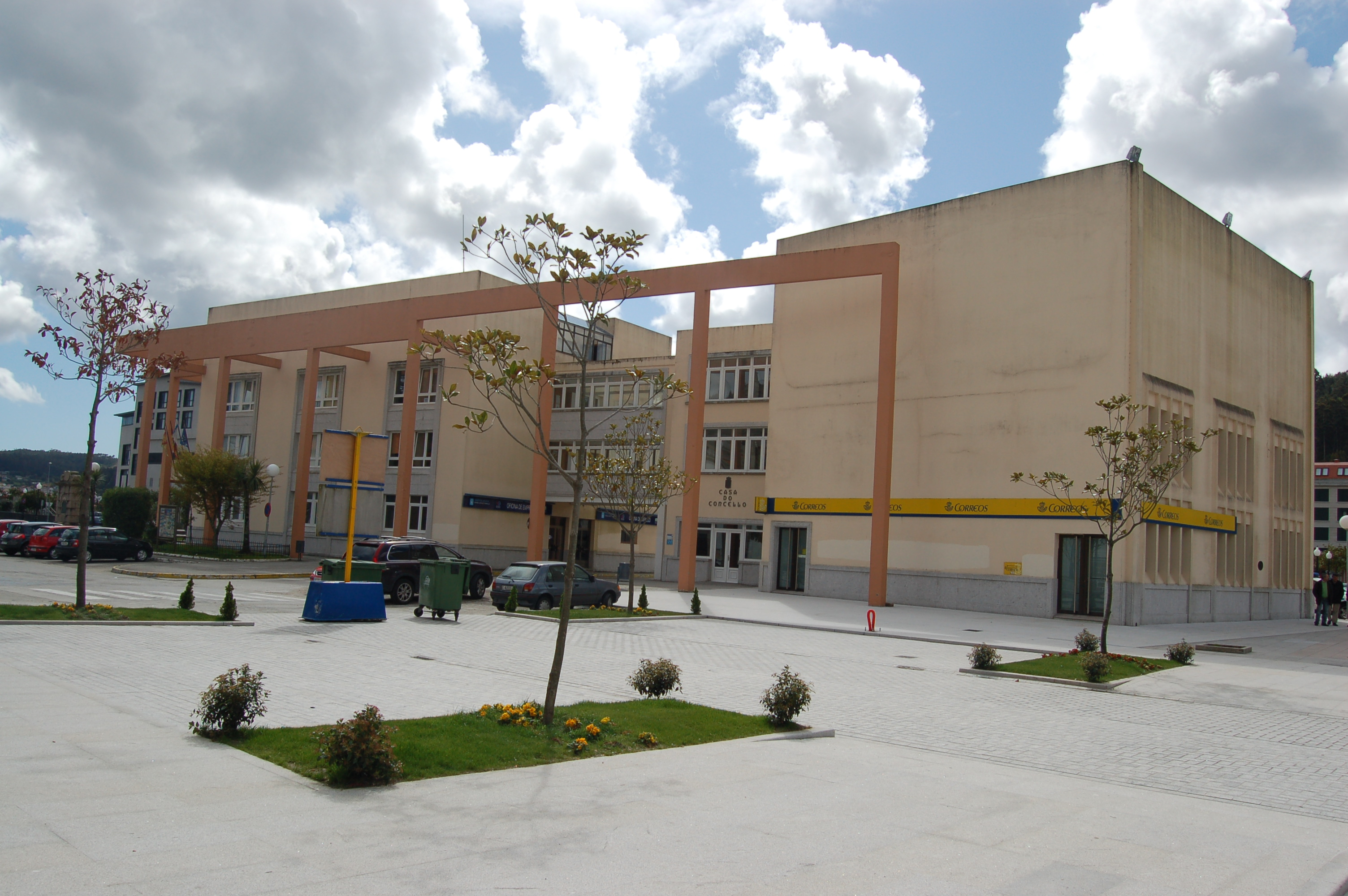 casa consistorial de Cee Cee Categoría:Imaxes de Cee